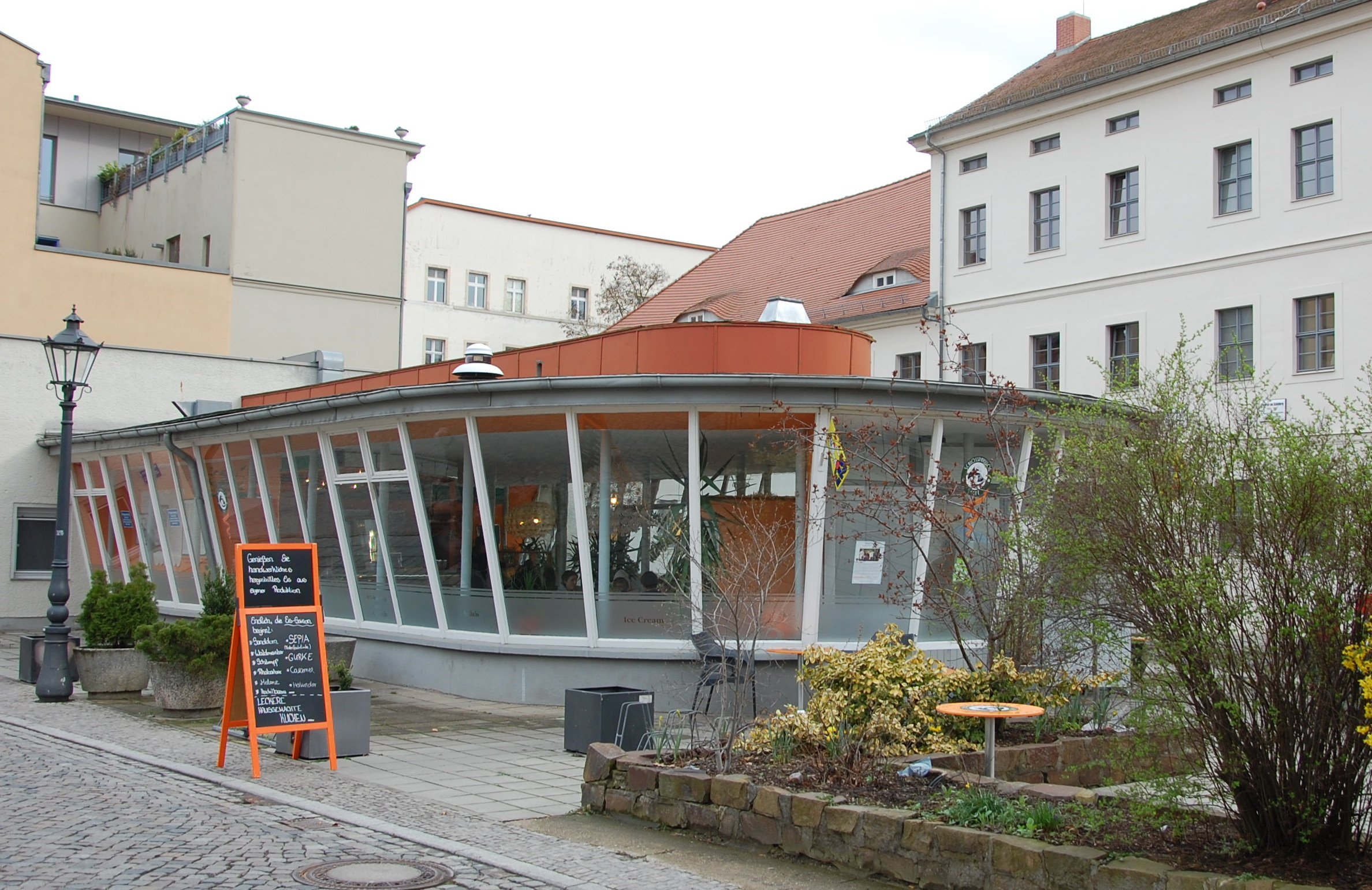 Eiscafe in Wittenberg